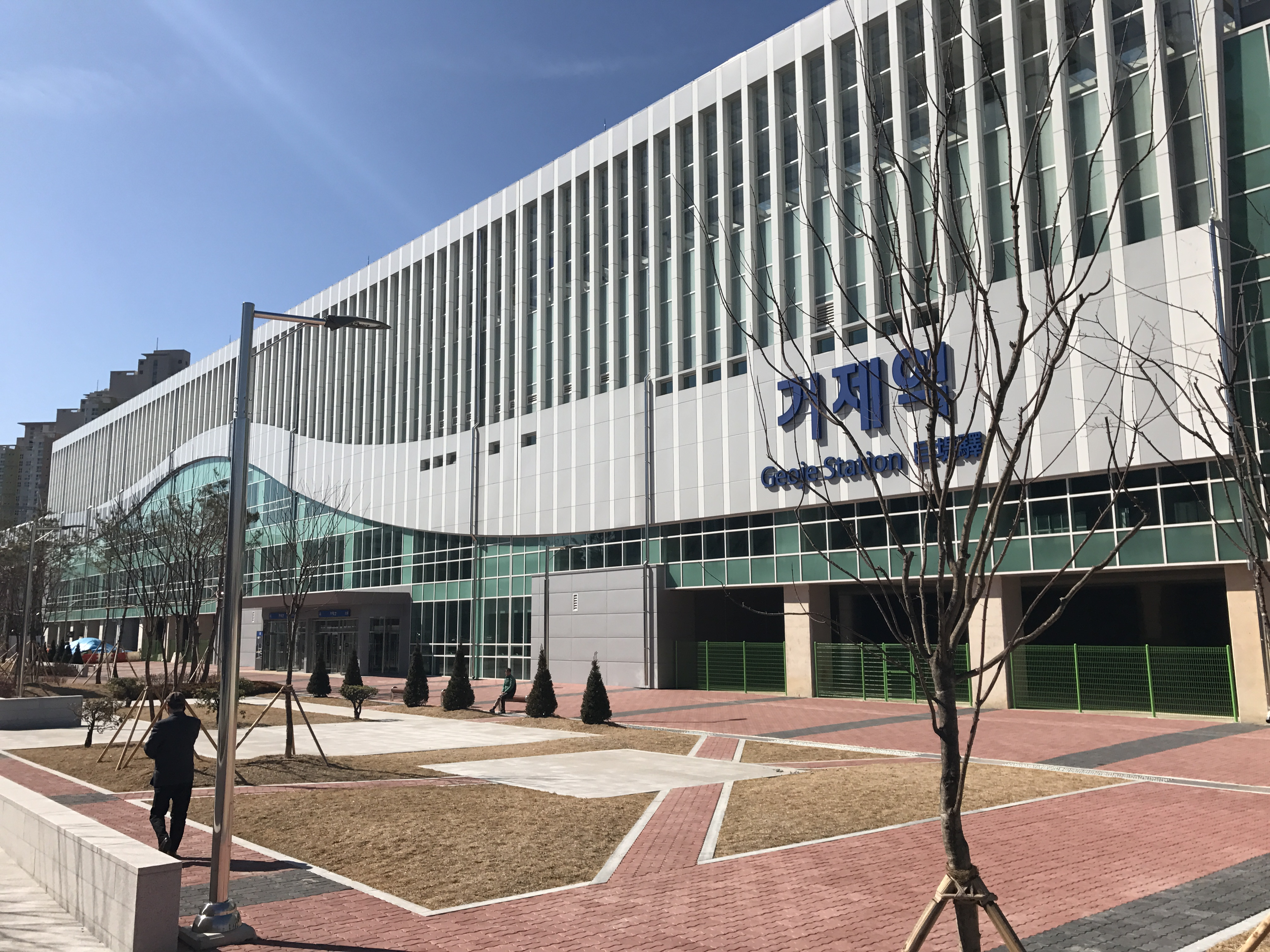 동해선 거제역 전경